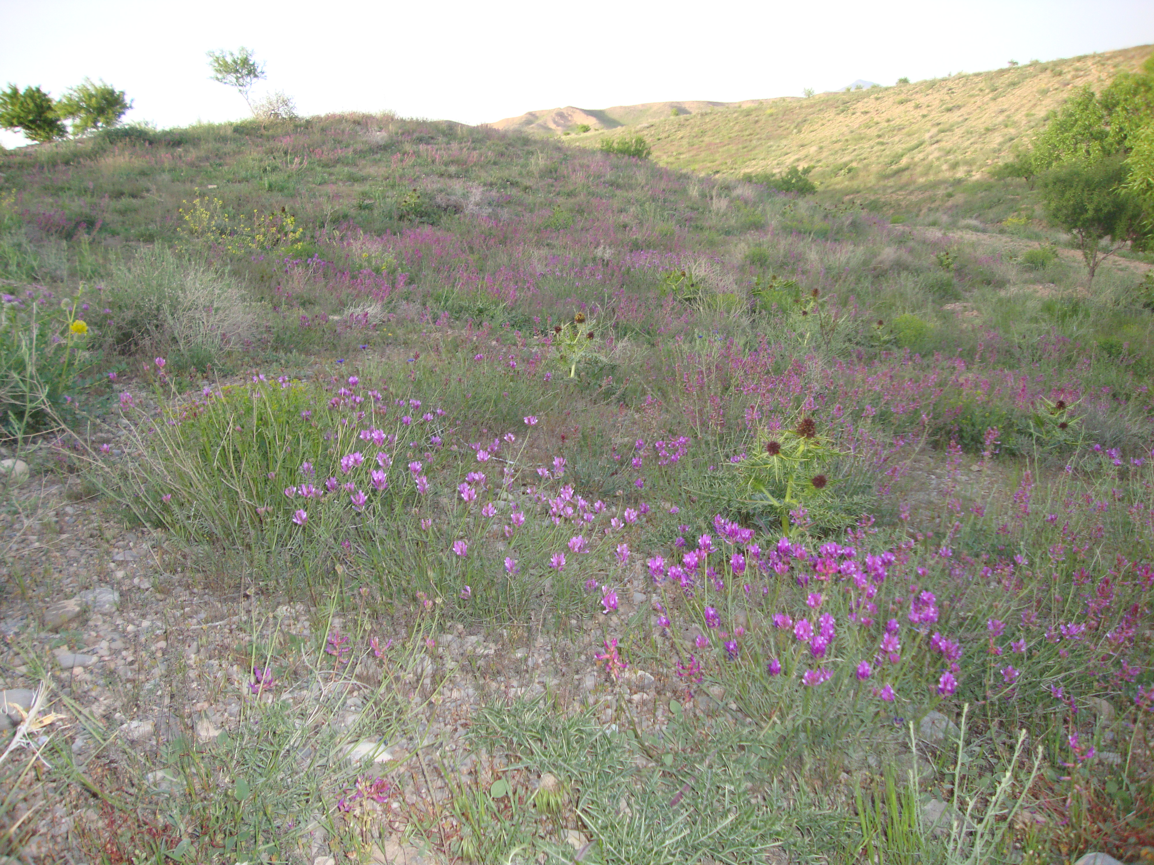 این عکس مربوط به پوشش گیاهی روستای زالی است که در اردیبهشت 1391 تهیه گردیده است.